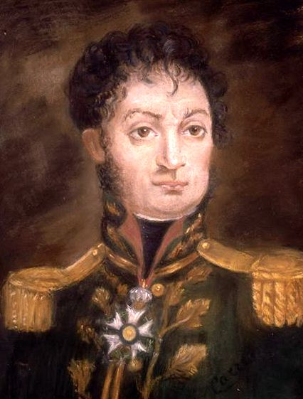 French general